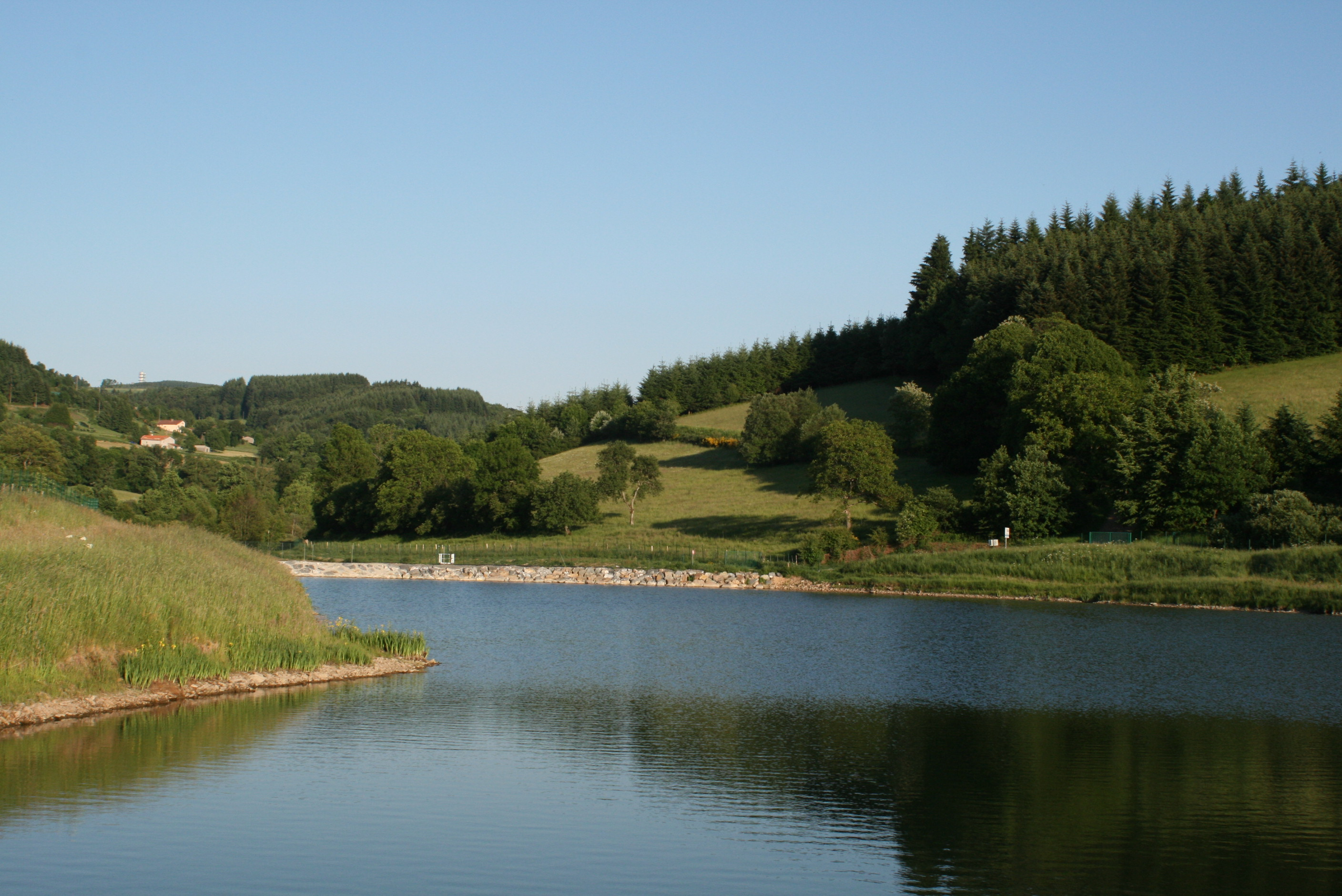 Barrage d'Echancieux. Violay (Loire). Vue sur la retenue